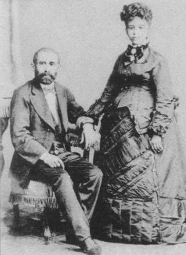 Gepatroj de Auta de Souza